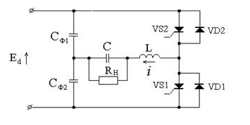 Напівмостова схема резонансного інвентора зі зворотніми діодами